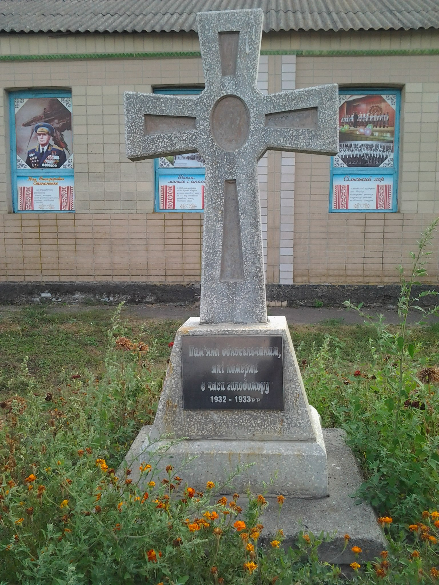 Хрест, встановлений пам'яті односельчанам, які померли в часи Голодомору 1932-33 рр. Село Нехайки, Драбівський р-н, Черкаська обл., Україна